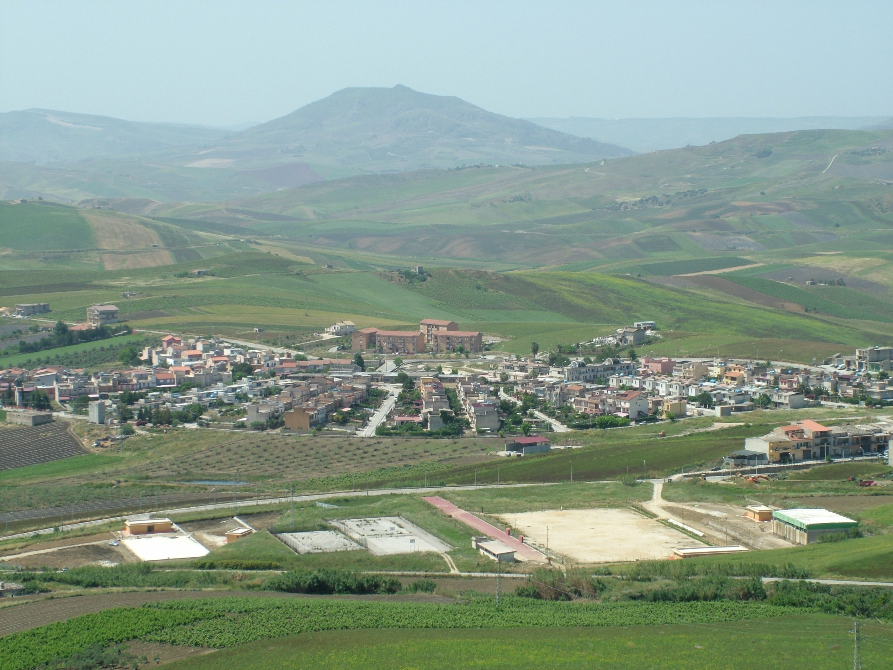 Camporeale, Provinz Palermo, Sizilien, die Häuser um die Viale delle Rose